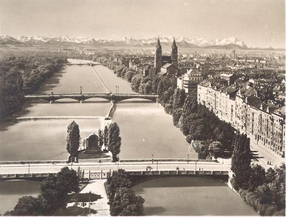 Isarpartie mit Gebirge